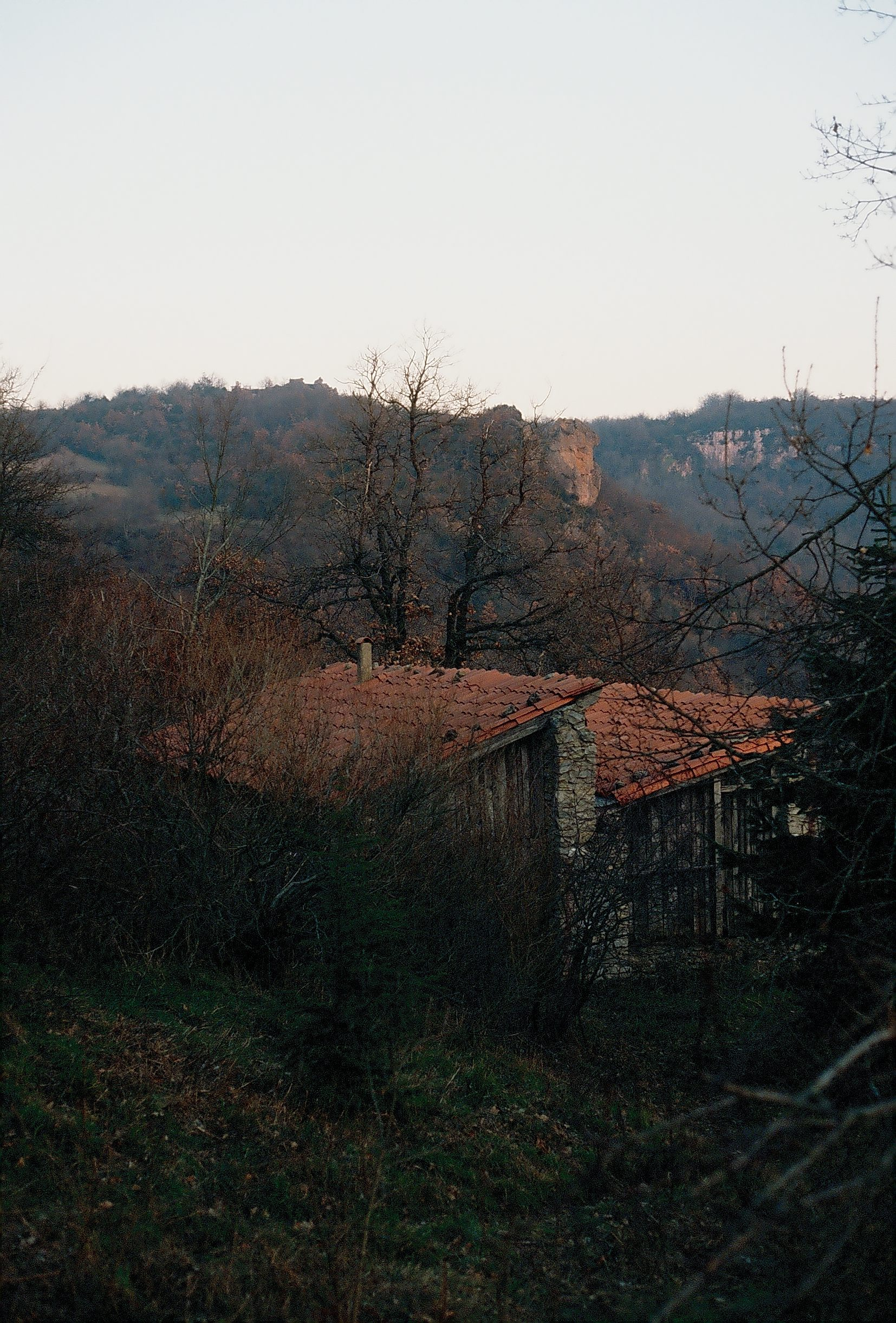 Nogaret, Roqueredonde (Haut-Languedoc), Hérault, France.